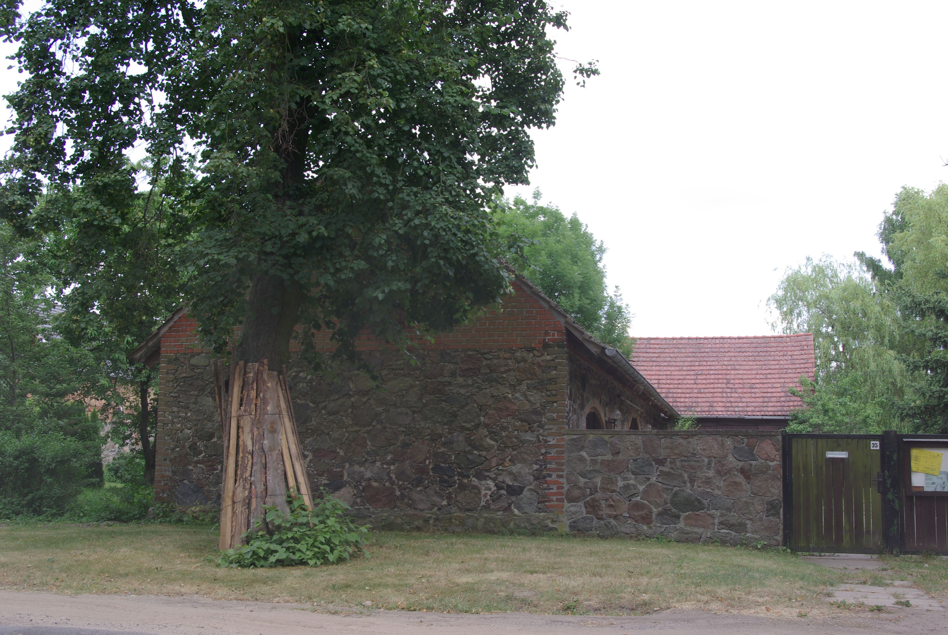 Rietz-Neuendorf Ortsteil Buckow in Brandenburg. Das Pfarrgehöft liegt gegenüber der Kirche und steht unter Denkmalschutz.